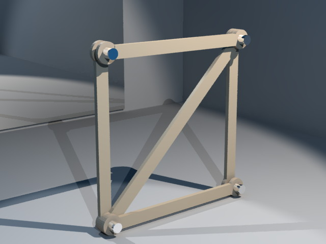 Voorbeeld van een statisch bepaald vakwerk: de hoekpunten zijn scharnieren, maar vervorming tot een parallellogram wordt tegengegaan door de diagonale verbinding. (Gebruikte software: Blender/YafRay).